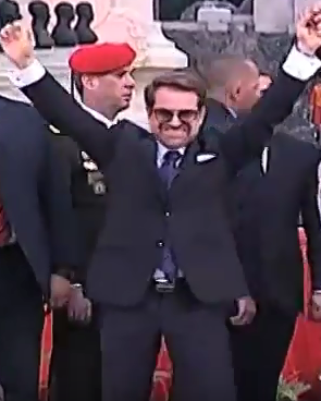 Lacava antes de ser juramentado como gobernador de Carabobo